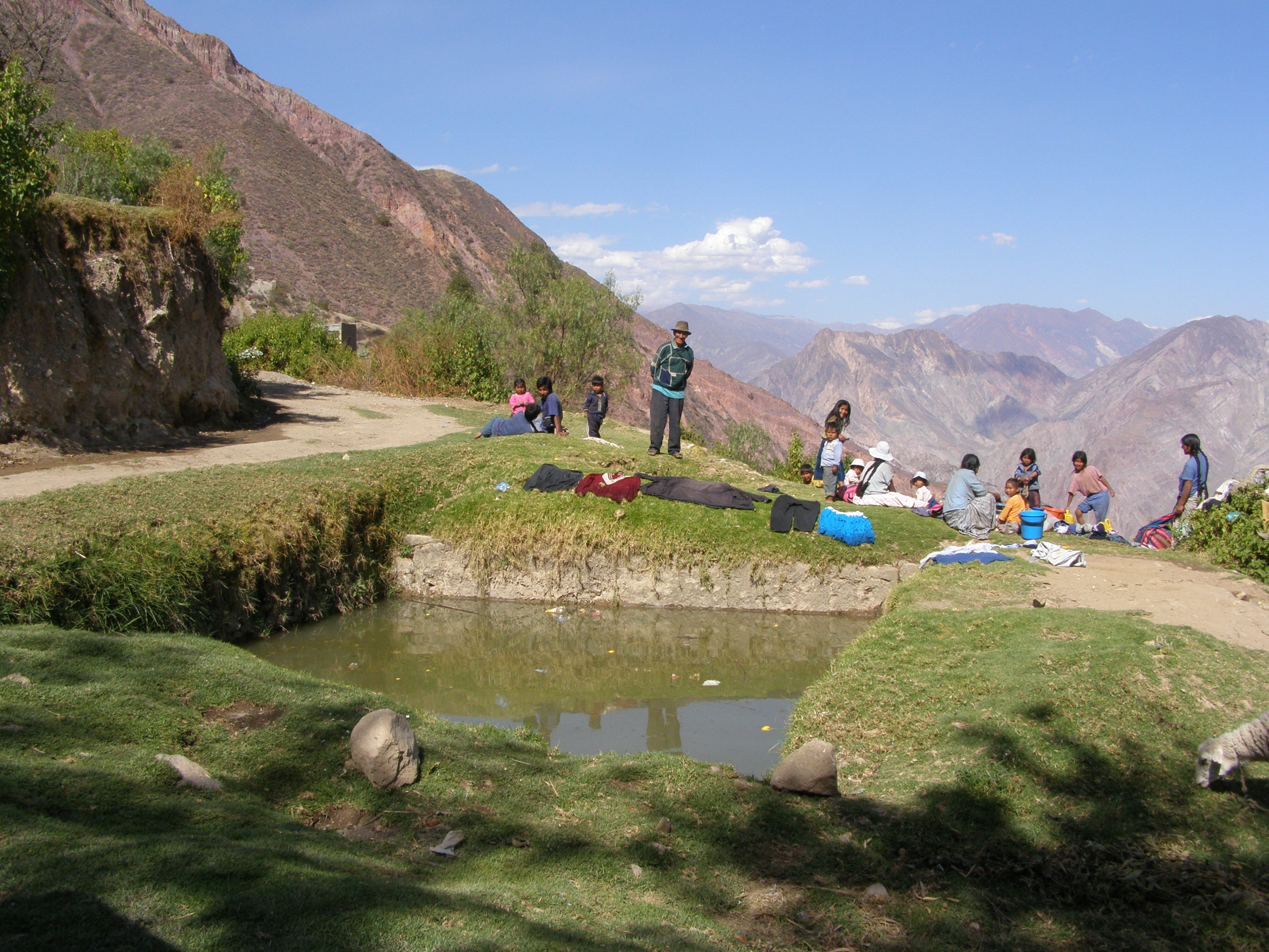 eigen werk